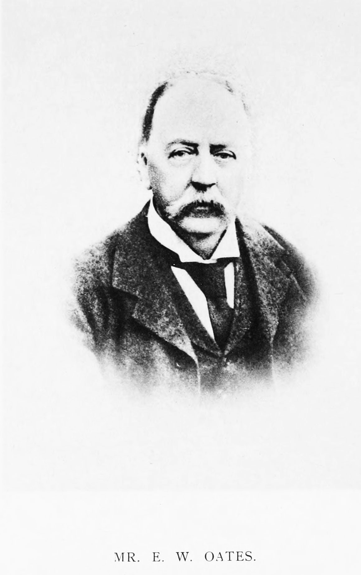 Eugene William Oates (December 31, 1845 – November 16, 1911)